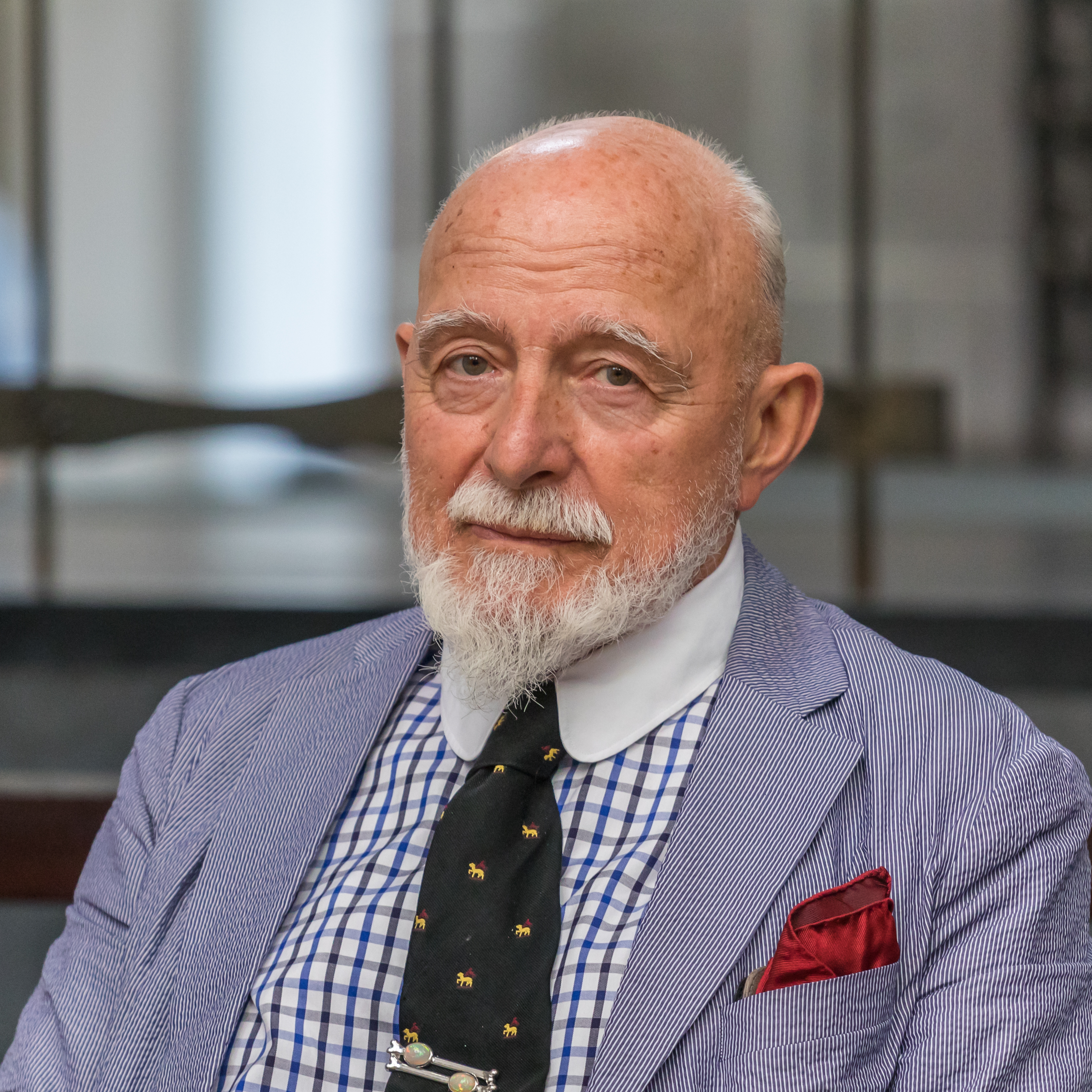 Vorstellung des ersten von elf neuen Kirchenfenstern von Markus Lüpertz in St. Andreas, Köln